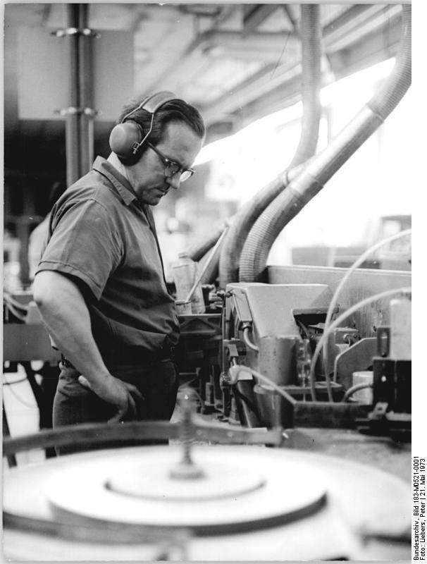 Eisenberg, VEB Möbelkombinat, Fertigungsstraße ADN-ZB Liebers-21.5.73 Bez.Gera:Mehr Wohnraummöbel aus Eisenberg. Im Stammbetrieb des VEB Möbelkombinat Eisenberg überwacht Anlagenfahrer Erich Tümmler eine modern Taktstraße, auf der Türen, Setienwände und ander Möbelteile produziert werden.Die Brigade "Artur Becker" , der Erich Tümmler angehört, arbeitet nach einem kollektiv schöpferischen Plan, mit dem sie dazu beitragen will, daß die tägliche Leistung der Taktstraße von 9000 Teilen auf 11.000 Teile gesteigert werden kann.